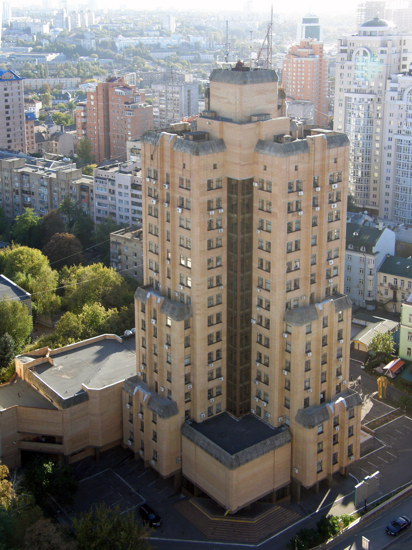 Министерство юстиции Украины